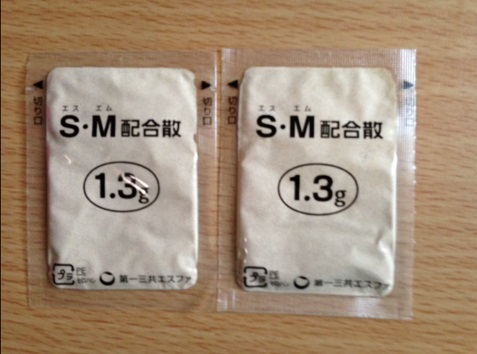 最新の包装